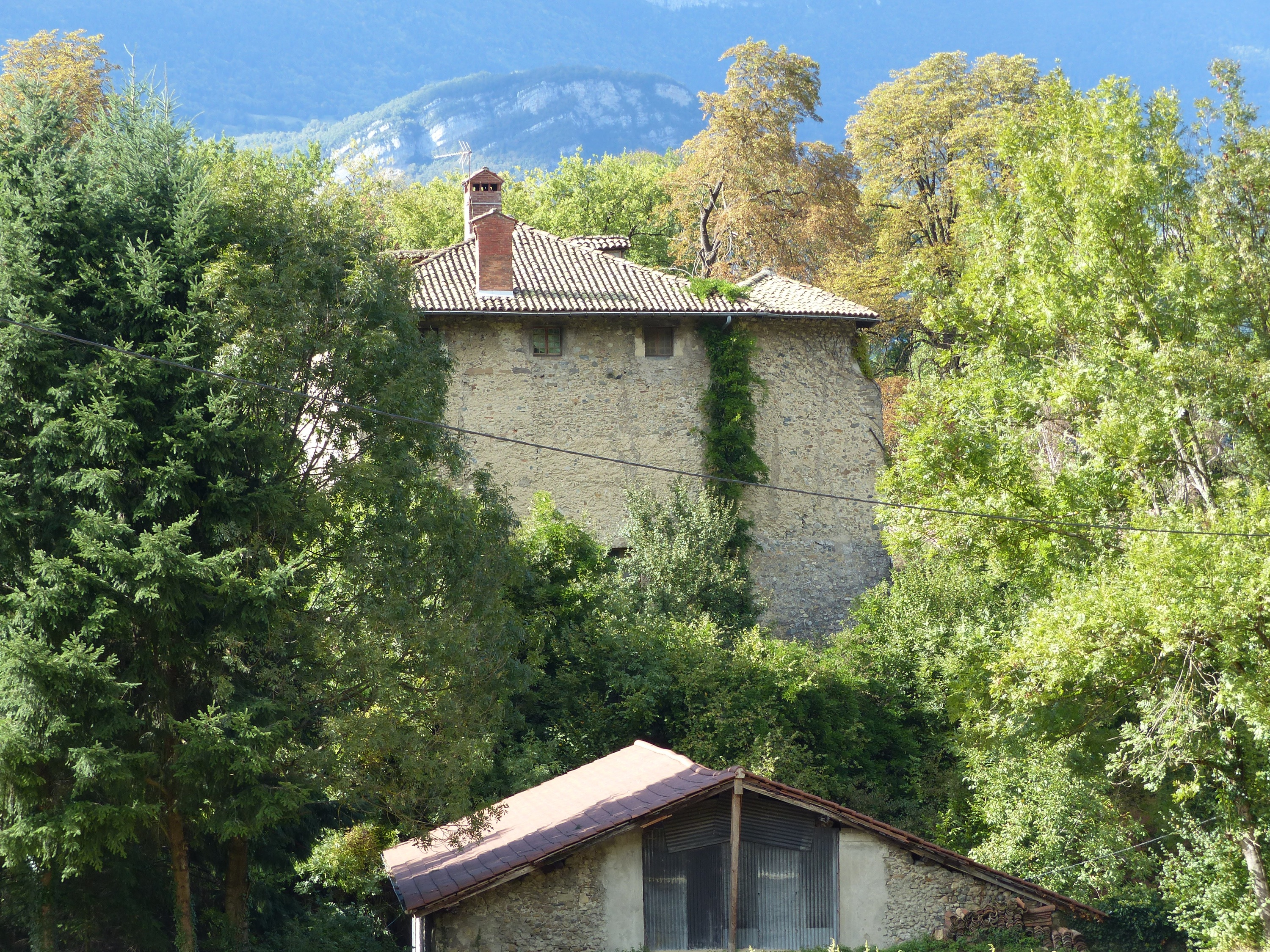 Château de La Pierre (Isère, France), vue sur l'enceinte (XVe)